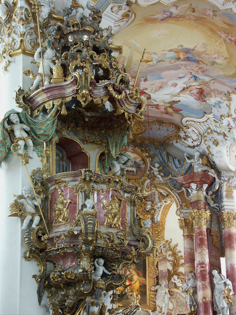 Wies church (Wieskirche), Germany - Pulpit